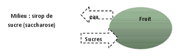 osmose